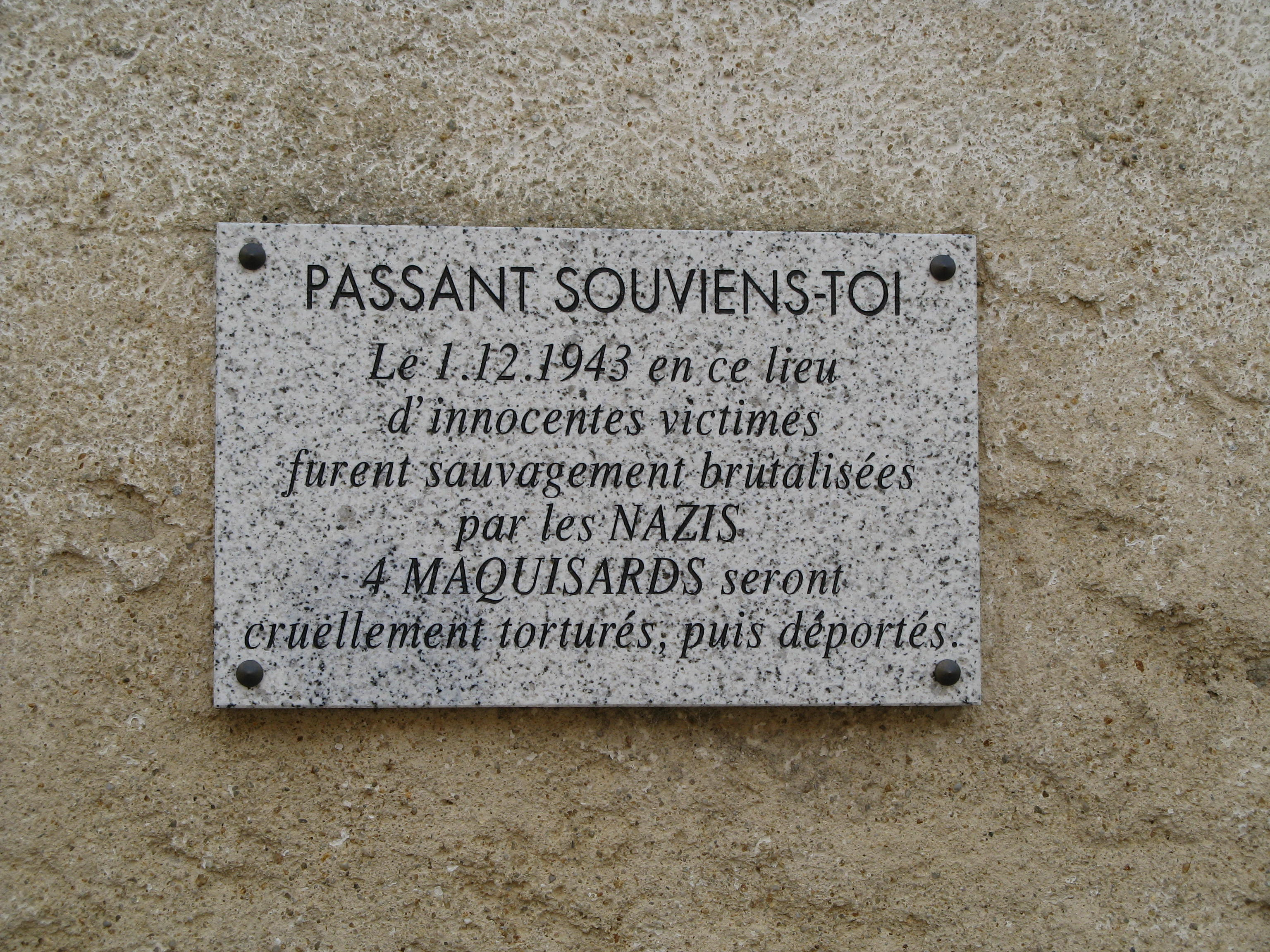 Plaque en souvenir des maquisard déportés le 1 décembre 1943